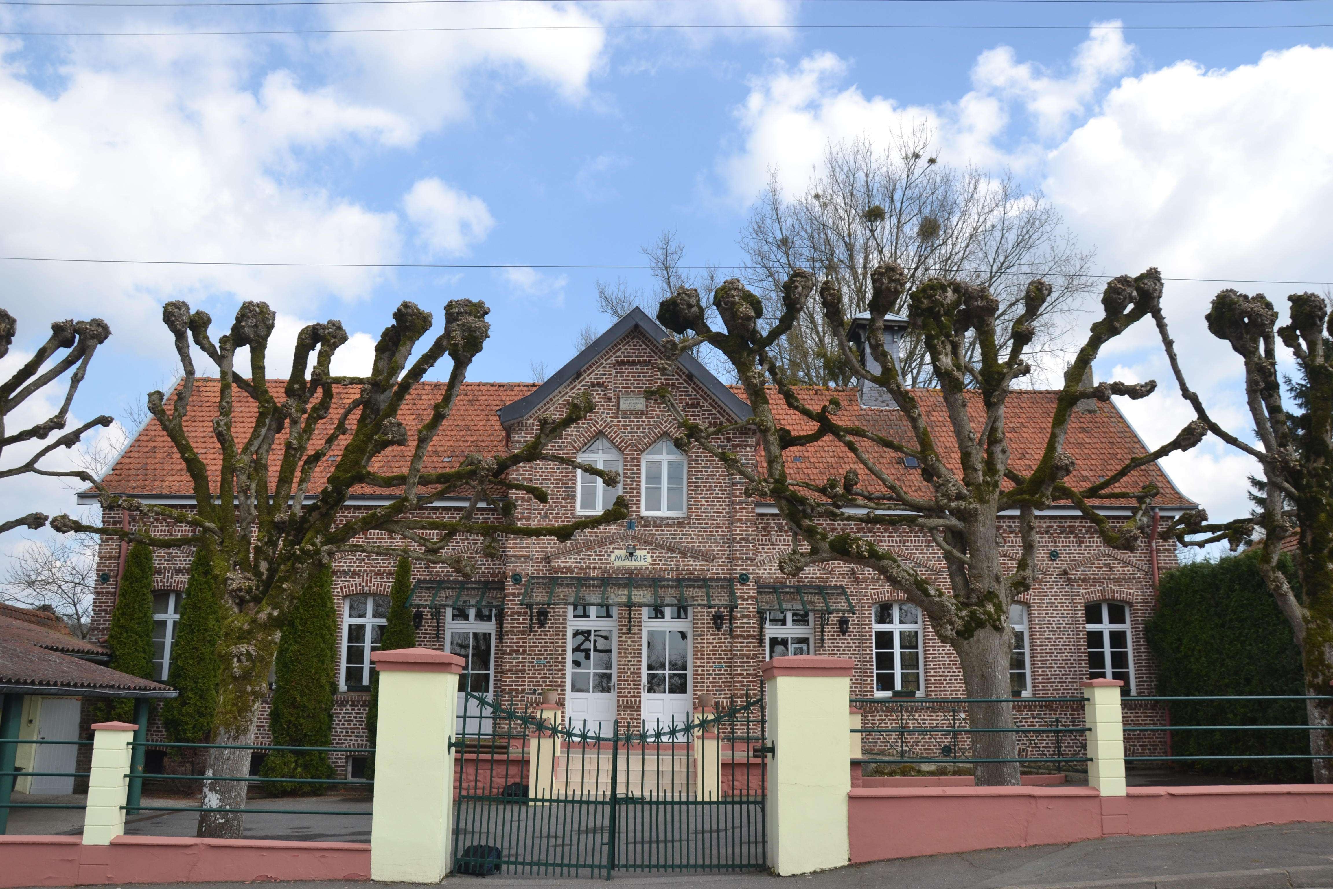 La mairie-école de Lebiez